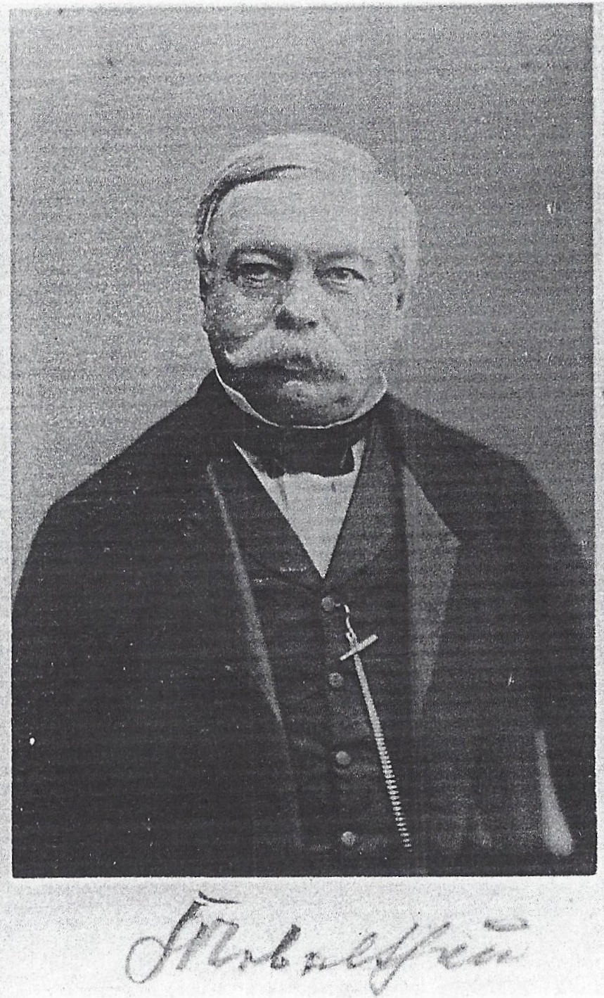 Signierte Porträtfotografie von Friedrich August Wilhelm Nebelthau (1806-1875)